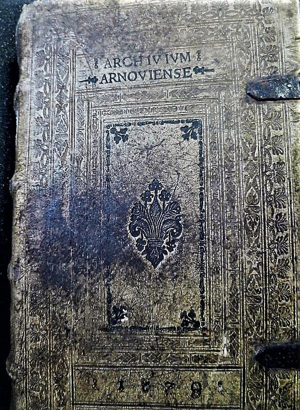 Buchdeckel des ältesten erhaltenen Stadtbuches der Stadt Arnau im Riesengebirge, tschech. Hostinne, das Buch befindet sich im Statni Oblastni Archiv Zamrsk in der Tschechischen Republik